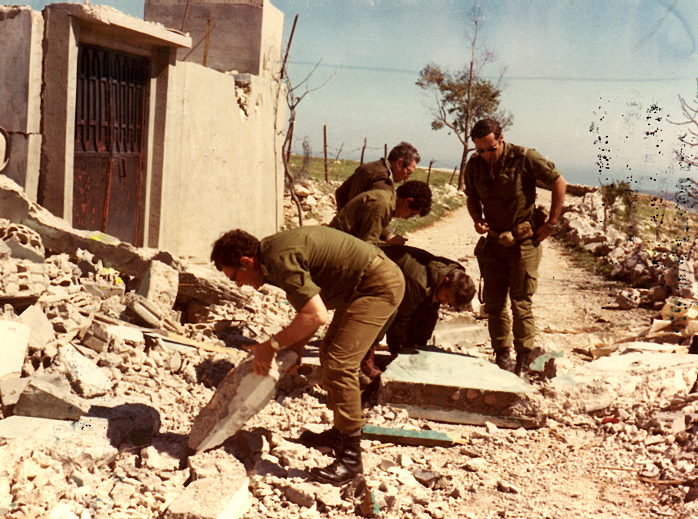 אפריל 1978- מבצע ליטני: ראש אמ"ן שלמה גזית וקציניו, במוצב הצפוני ליד ראש הניקרה.